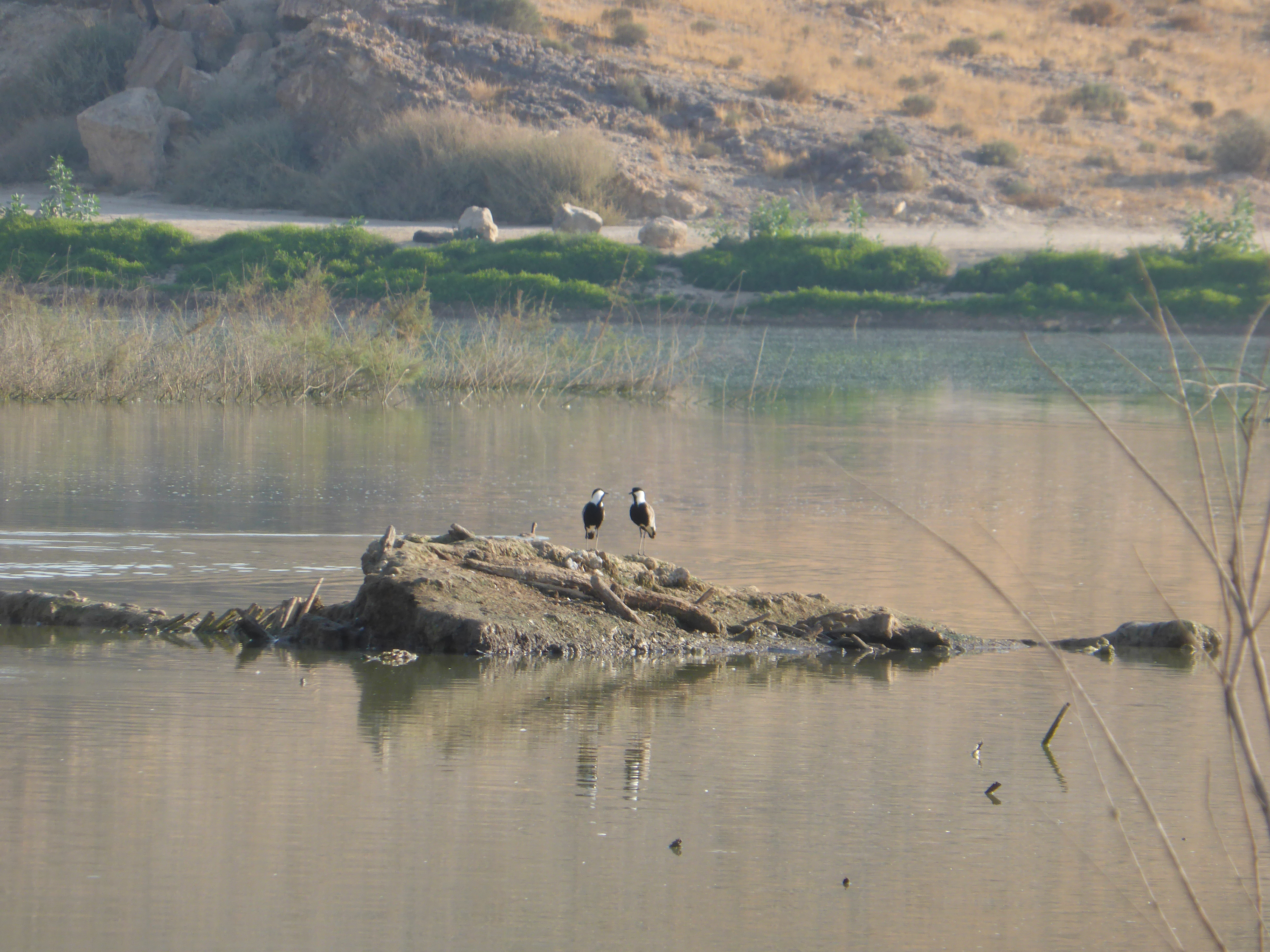 שני סיקסקים בפארק אגם ירוחם Vanellus spinosus